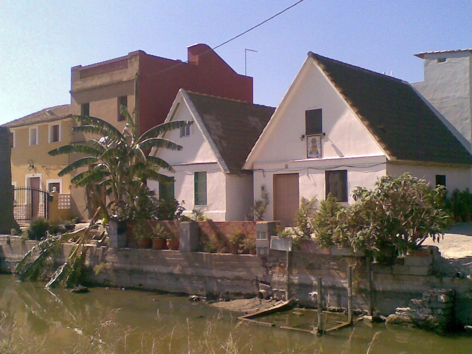 las tipicas barracas valencianas que ha fechas de hoy aun existen a la orilla de la acequia del pechinar